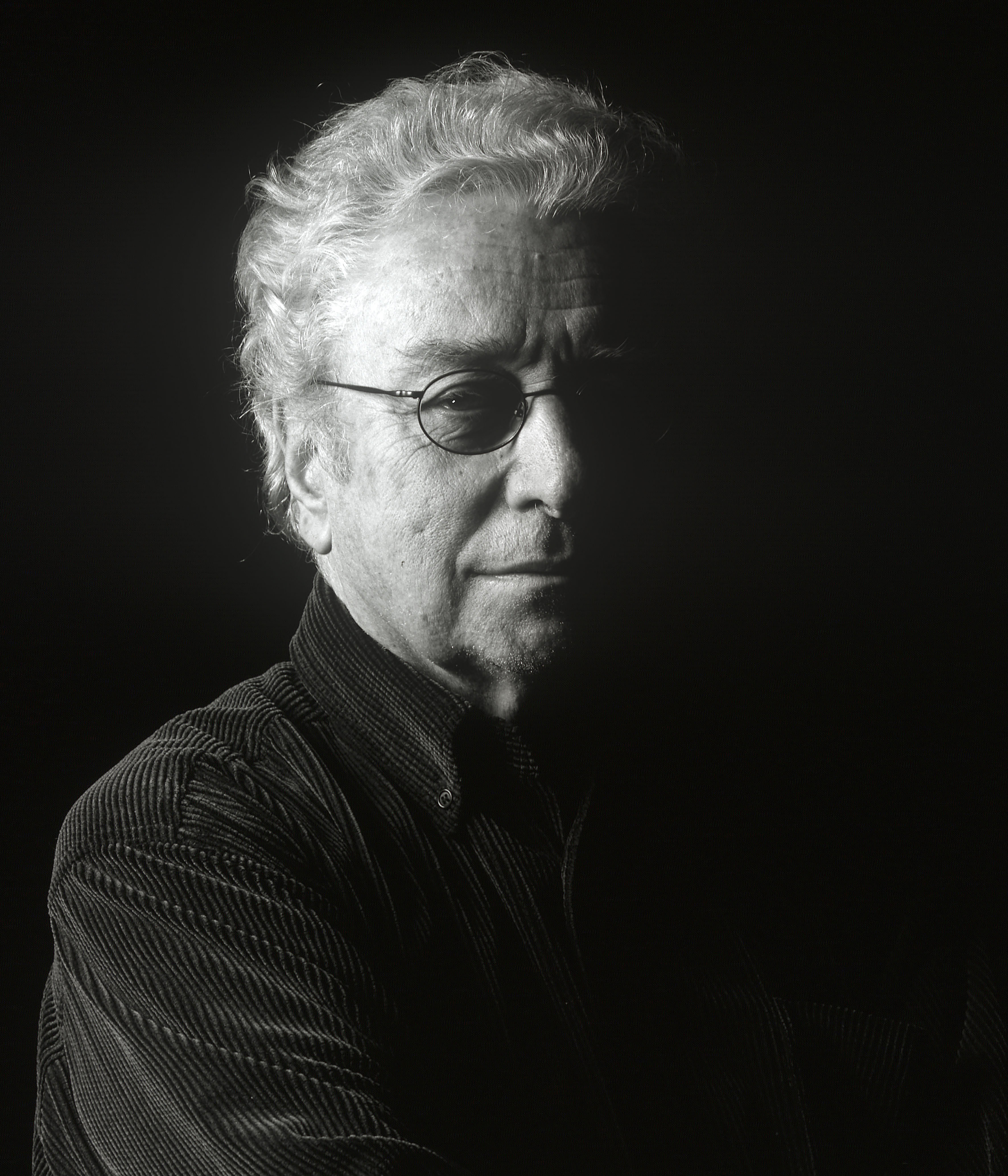 Walter Valentini fotografato da Andrea Valentini